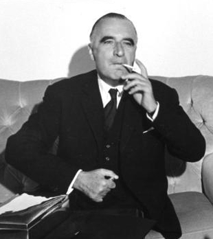 Georges Pompidou